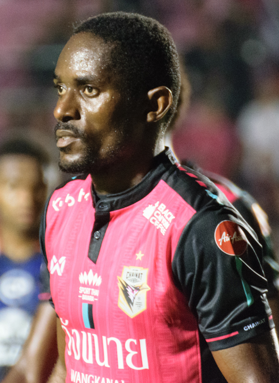 Bireme Diouf